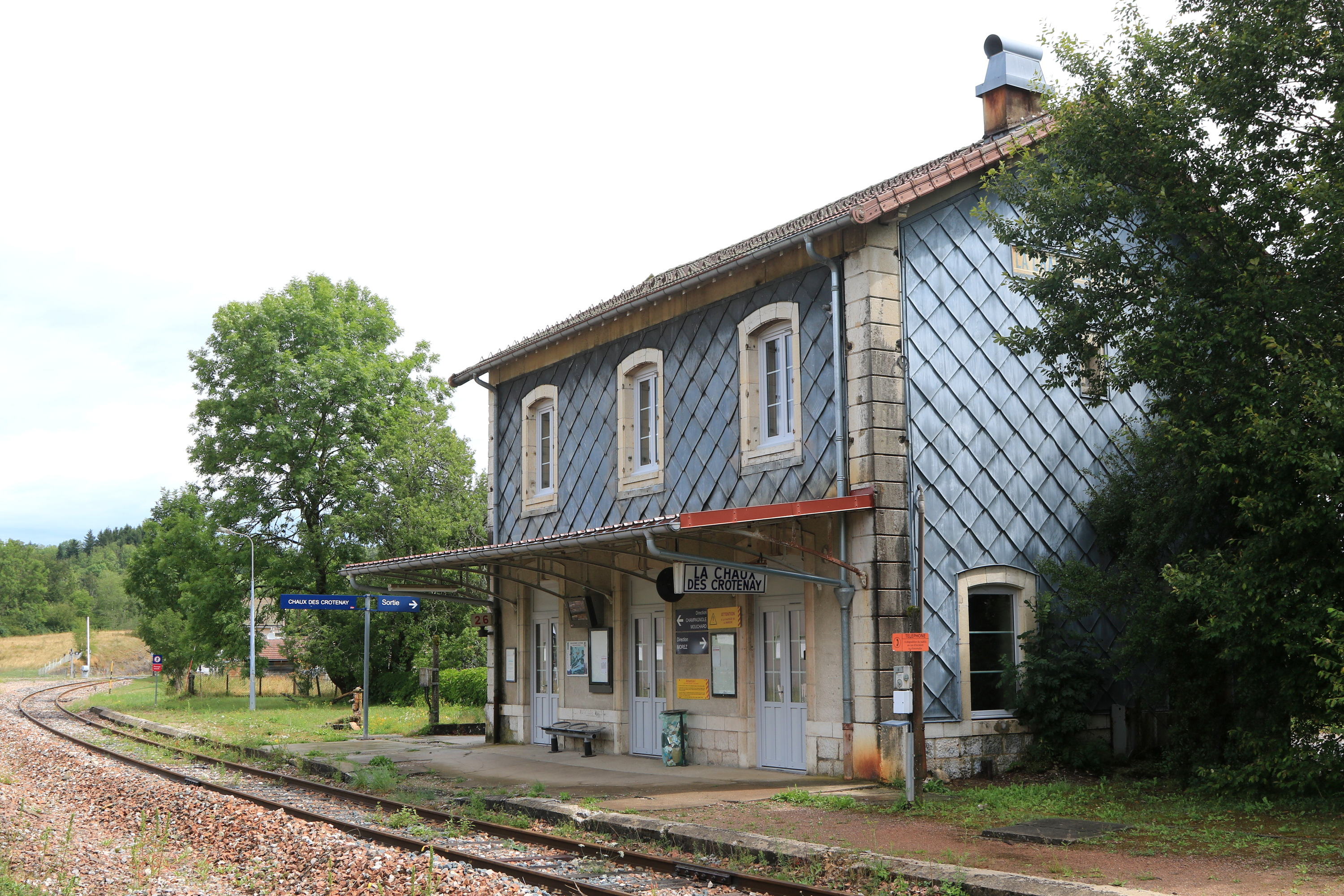 Bâtiment voyageurs vu côté voies de la gare de La Chaux-des-Crotenay.